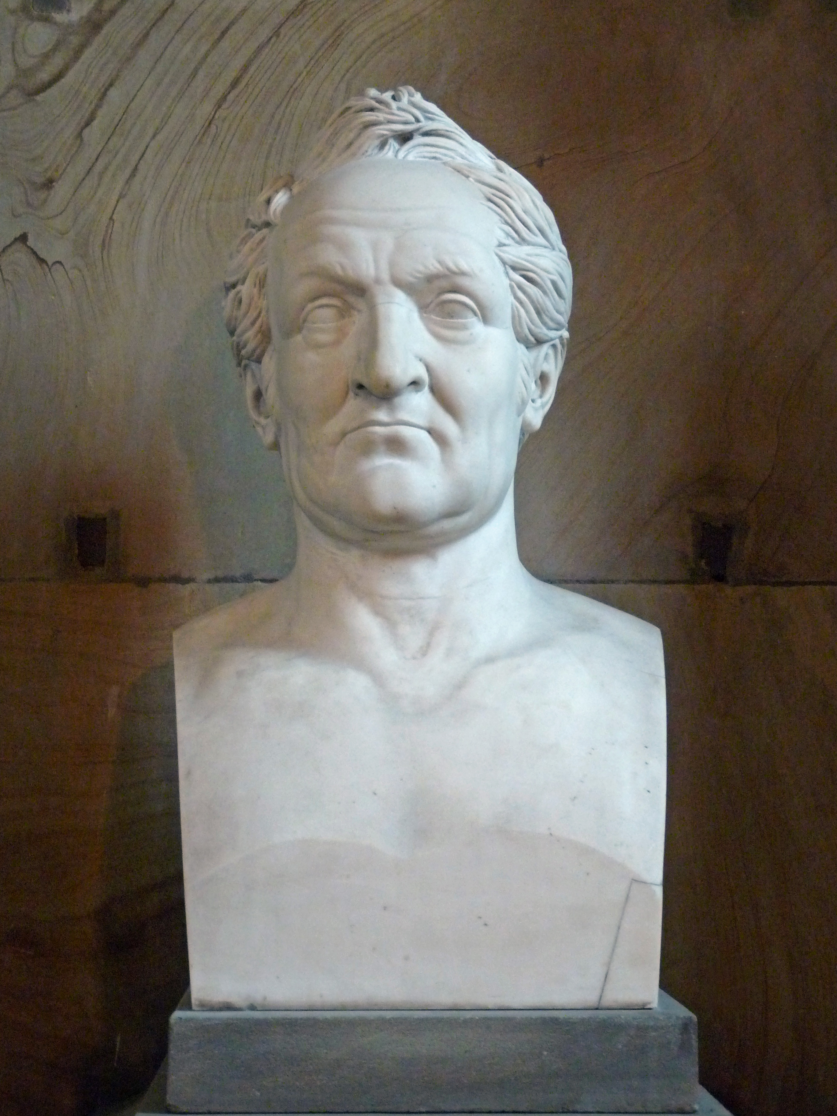 Strasbourg, Temple Neuf : buste de François Henri Redslob (1770-1834), signé par Joachim Frédéric Kirstein, 1835.